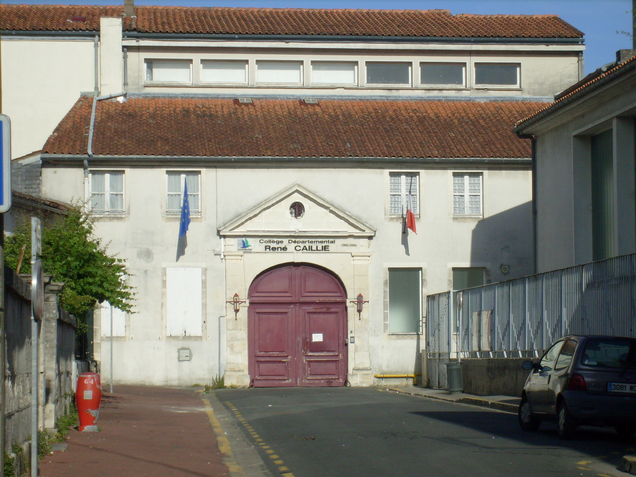 Collège René Caillé à Saintes